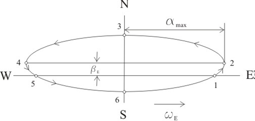 Видимо движение на полюса на жиромахалото